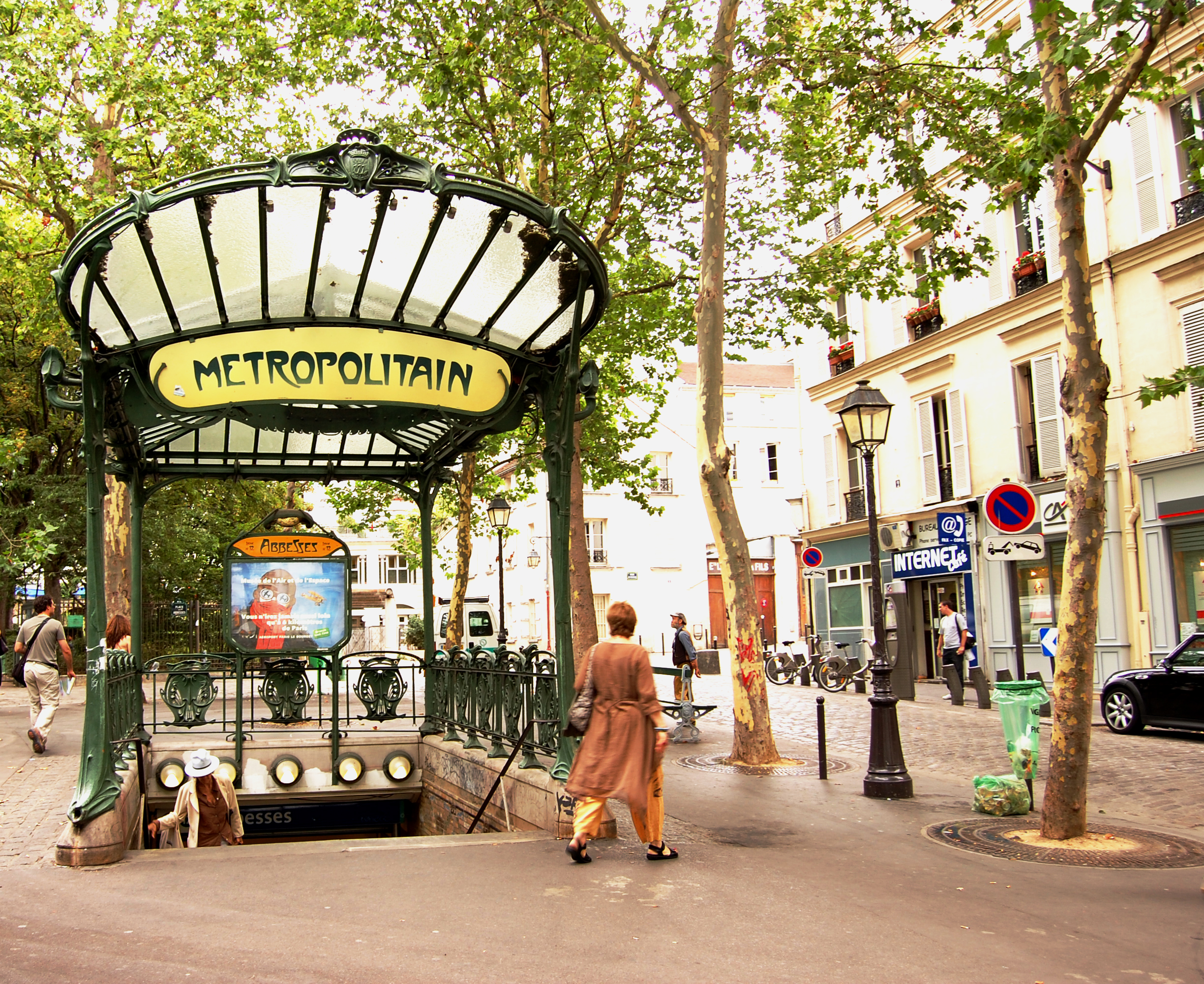 Abbesses (Paris Metro)